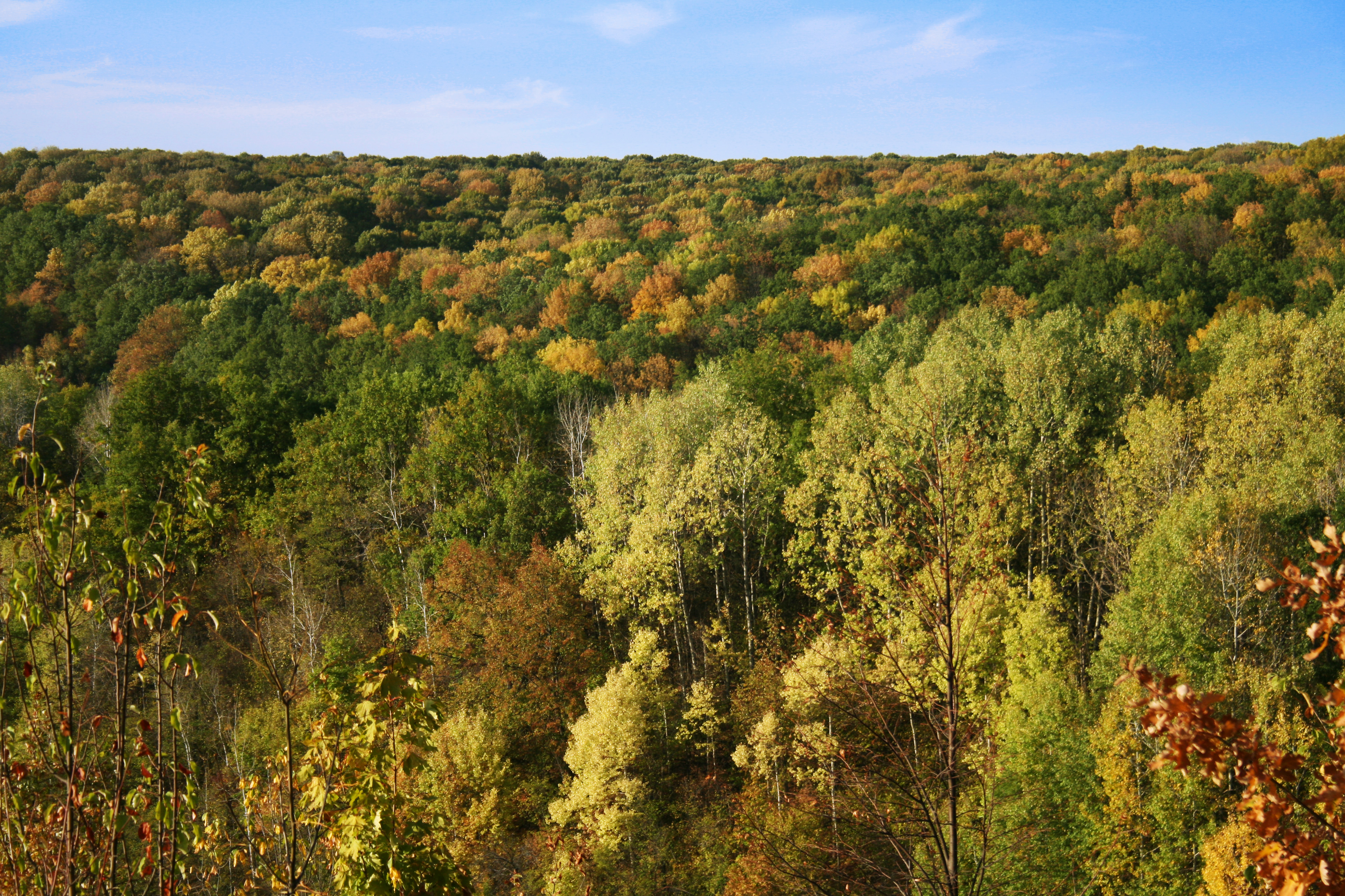 Дубово-ясеневый лес. Балка Каменный Лог, Белгородская область.